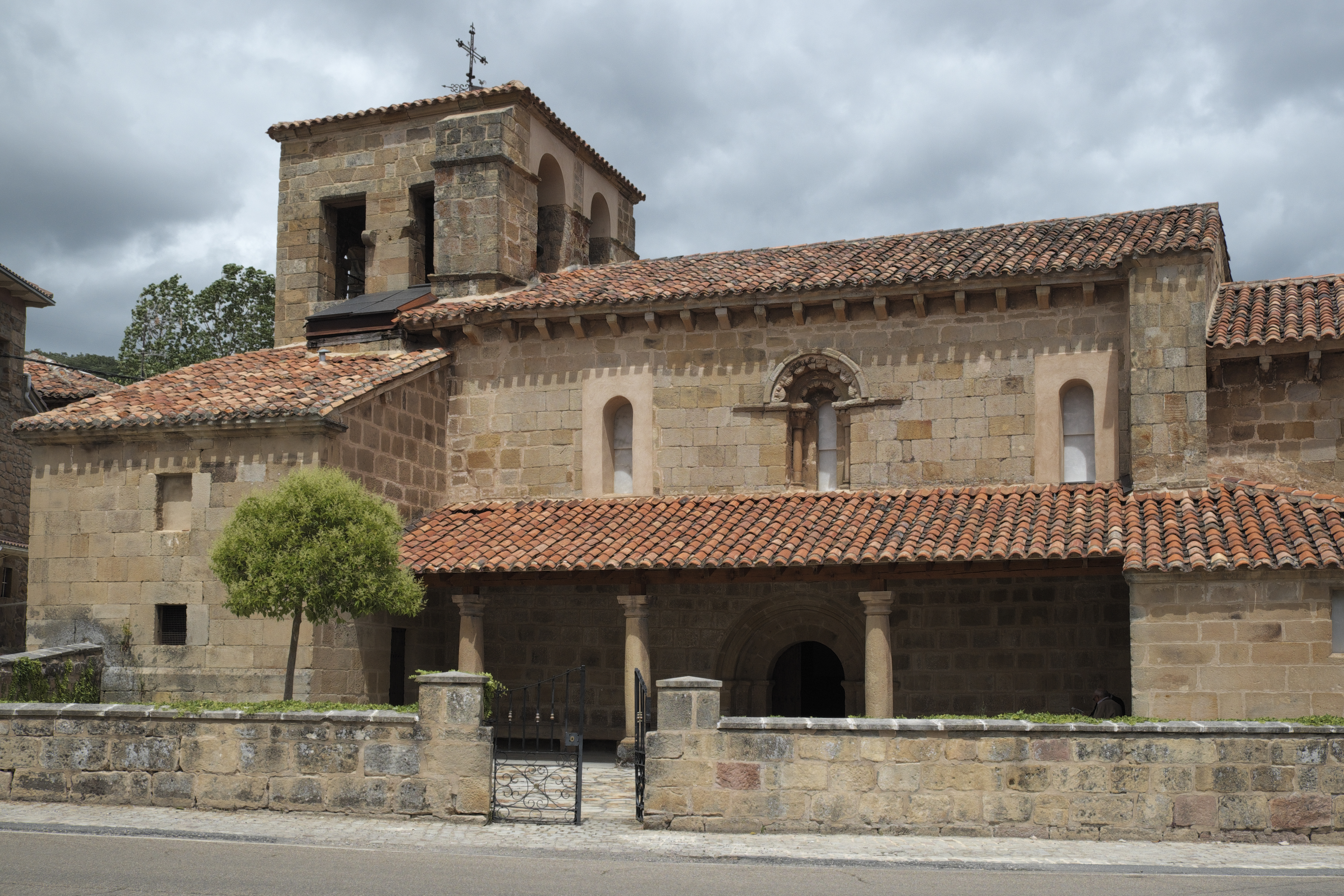 Katholische Pfarrkirche Santa María la Real in Cillamayor (Gemeinde Barruelo de Santullán) in der Provinz Palencia (Kastilien-León/Spanien), Ansicht von Süden